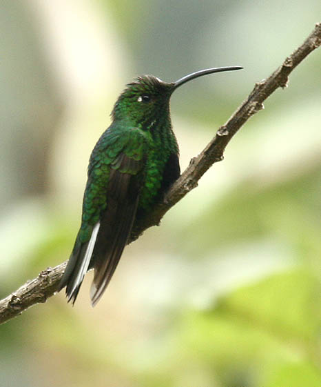 Mountain Velvetbreast (Lafresnaya lafresnayi). Yanacocha, Ecuador. 3/8/2007